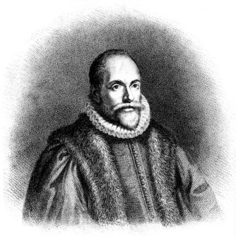 Jacobus Arminius, fundador de la doctrina. Jacó Arminius (1560-1609).